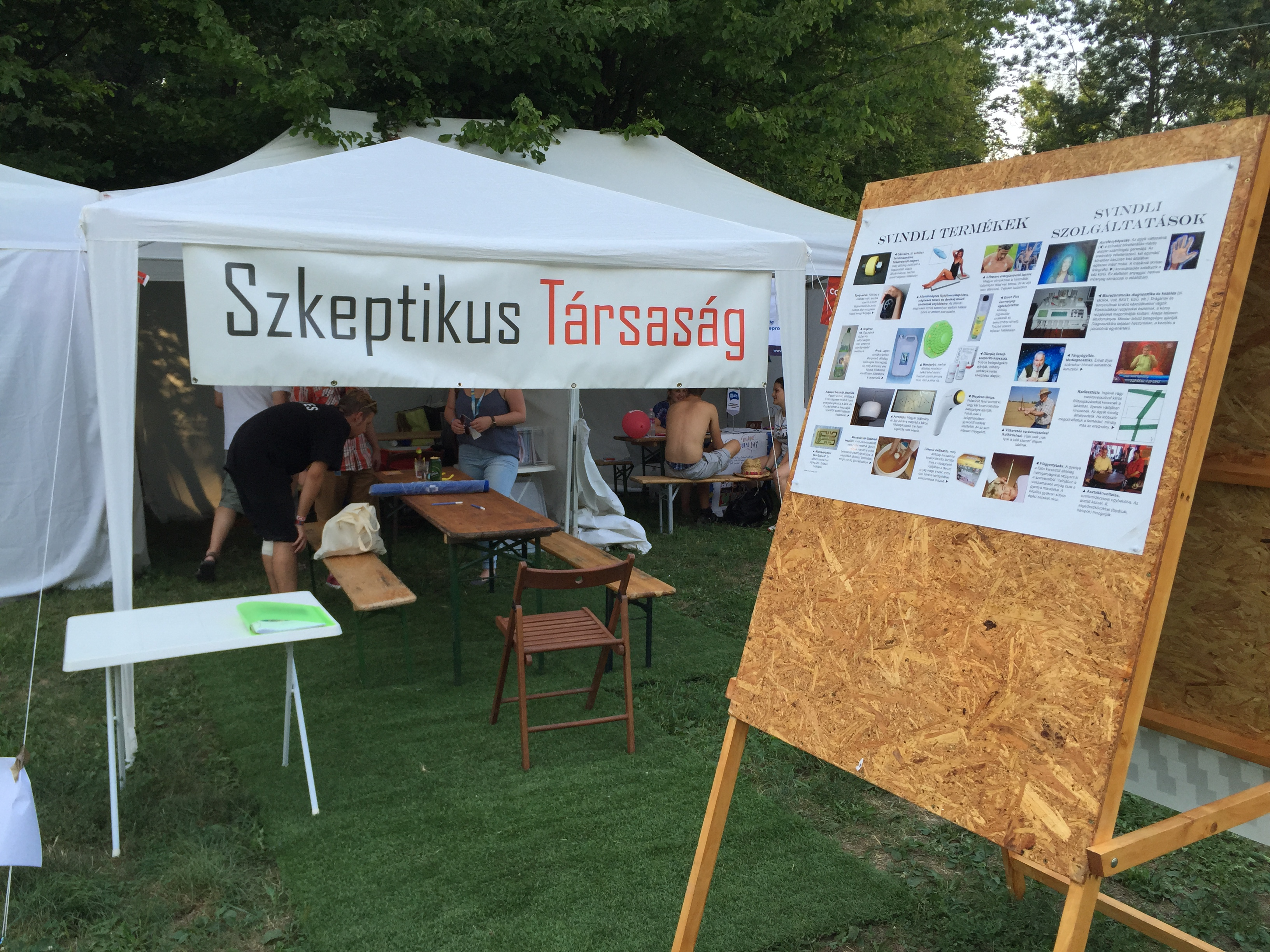 A Szkeptikus Társaság 2015-ös Sziget Fesztivál Civil Szigetén való részvételéről készült sorozat első képe, amely a felállított sátrat és a kiállított tárgyakat mutatja be.